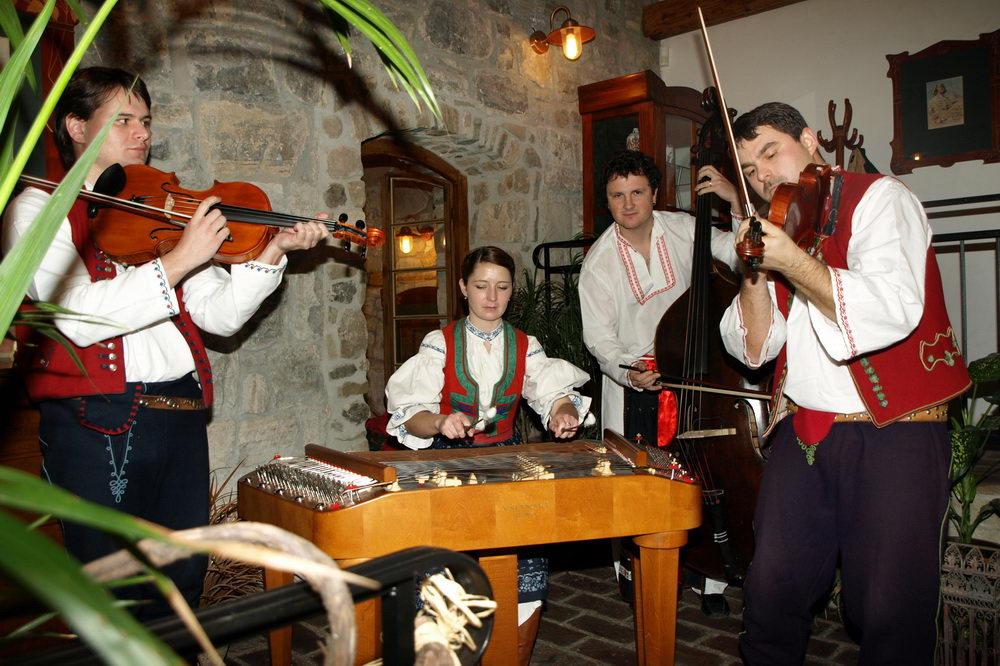 CM Slanina